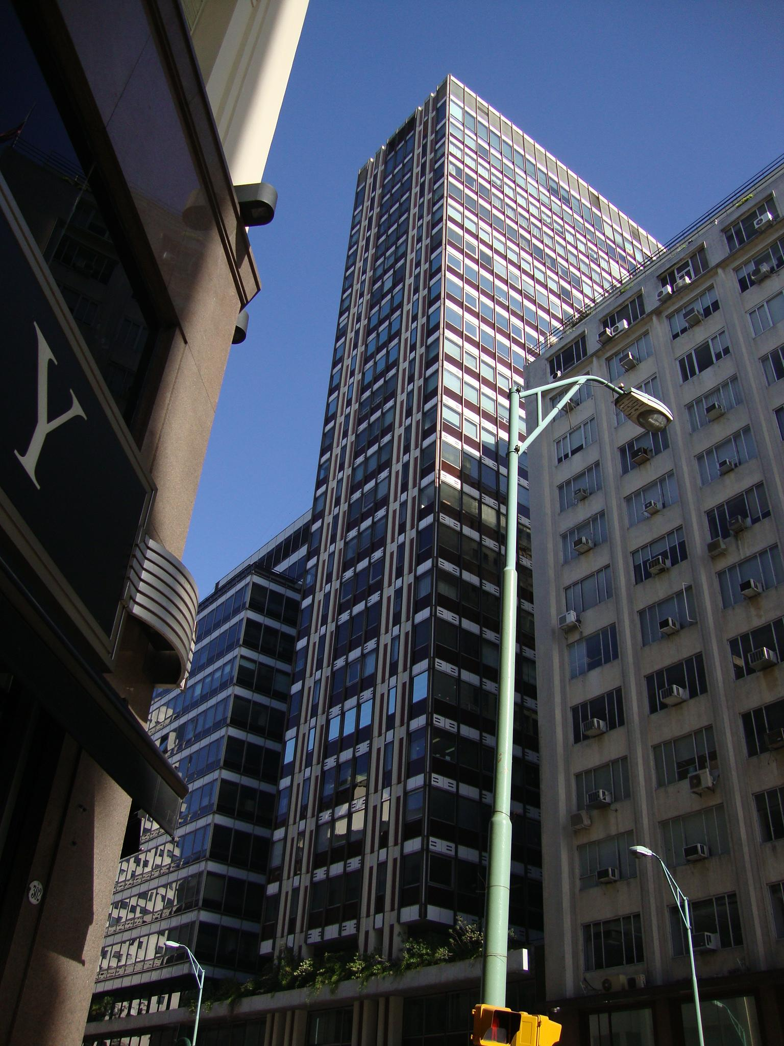 Torre del Club Alemán en Avenida Corrientes al 300.